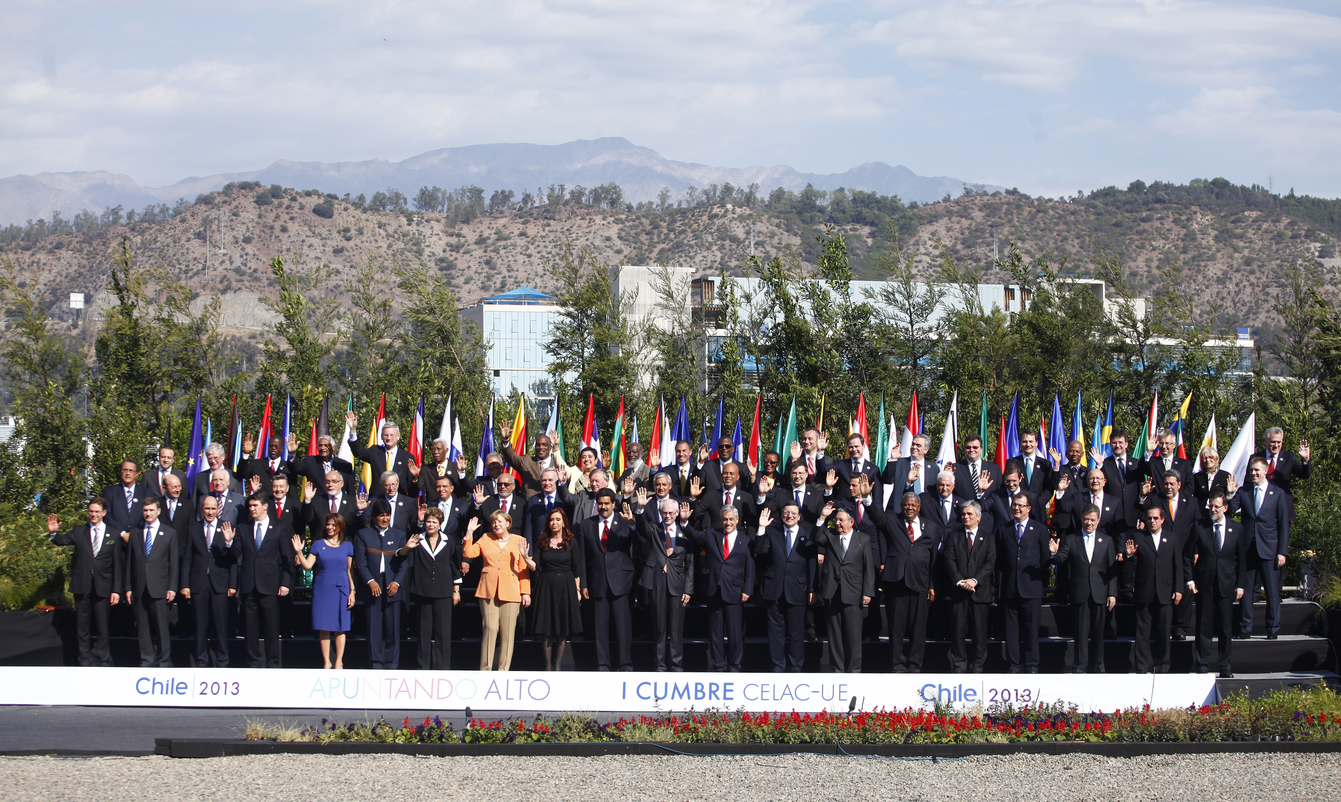 26. un 27. janvārī Čīles galvaspilsētā Santjago notiek ES un Latīņamerikas un Karību valstu kopienas (CELAC) samits. Dalībnieku kopbilde. FOTO: SEBASTIÁN RODRIGUEZ/AGENCIAUNO/PRENSA CUMBRE .